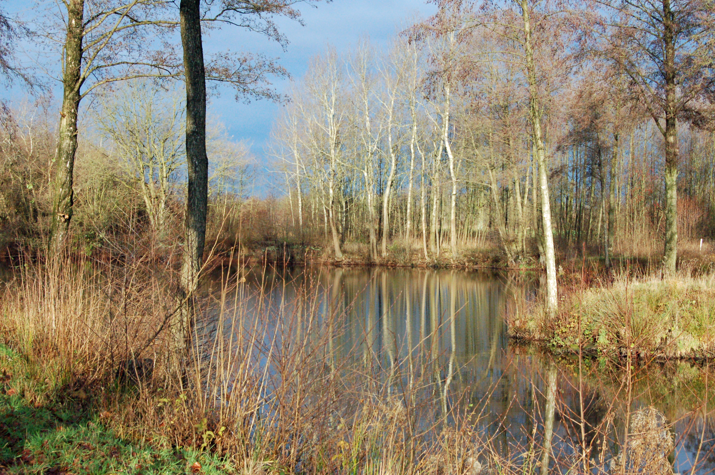 Ehemaliger Badeteich in Klein Nordende